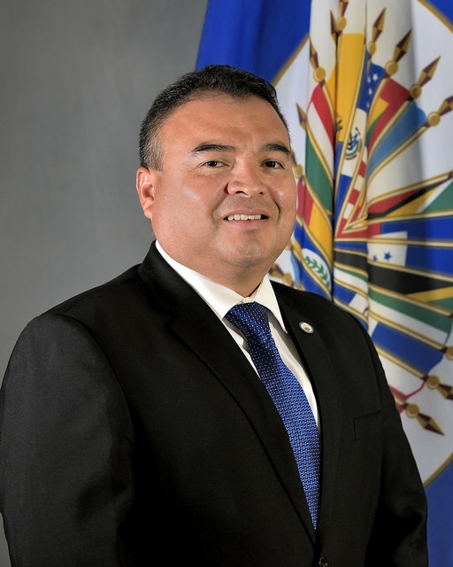 Nestor Mendez, Secretario General Adjunto- Organizacion de los Estados Americanos (OEA)